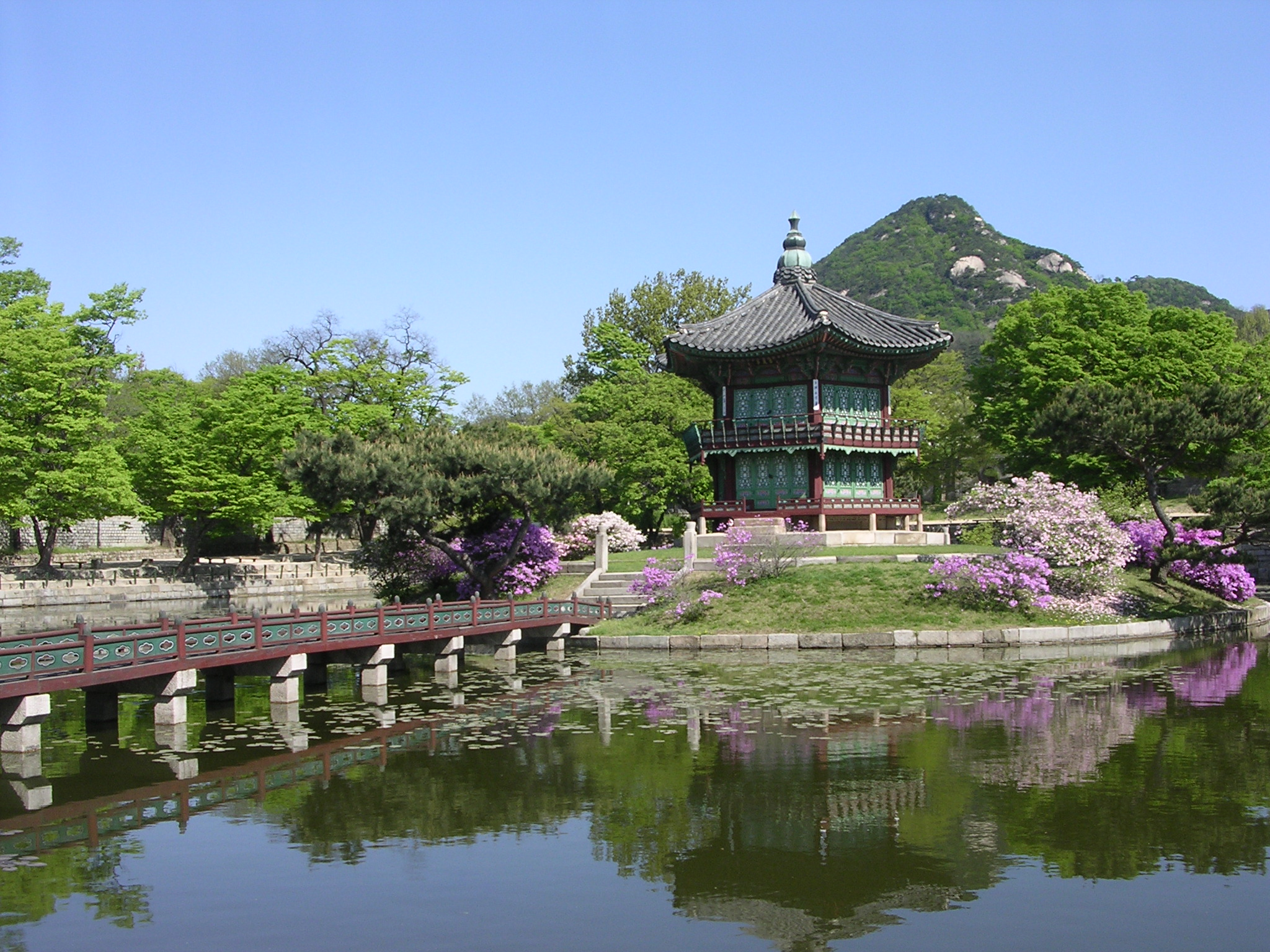 HyangWonJeong in Gyeongbokgung, Seoul.